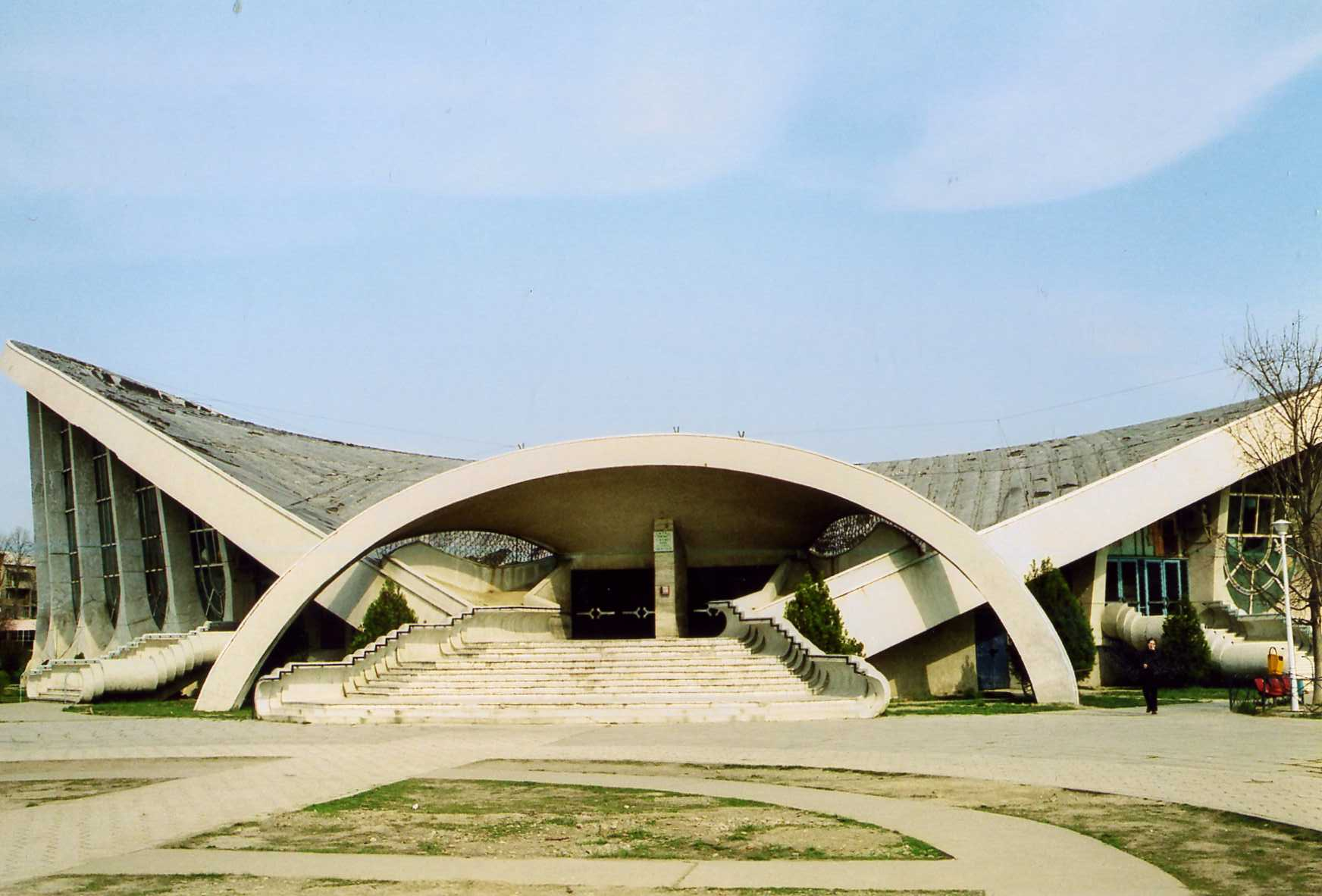 Bacău